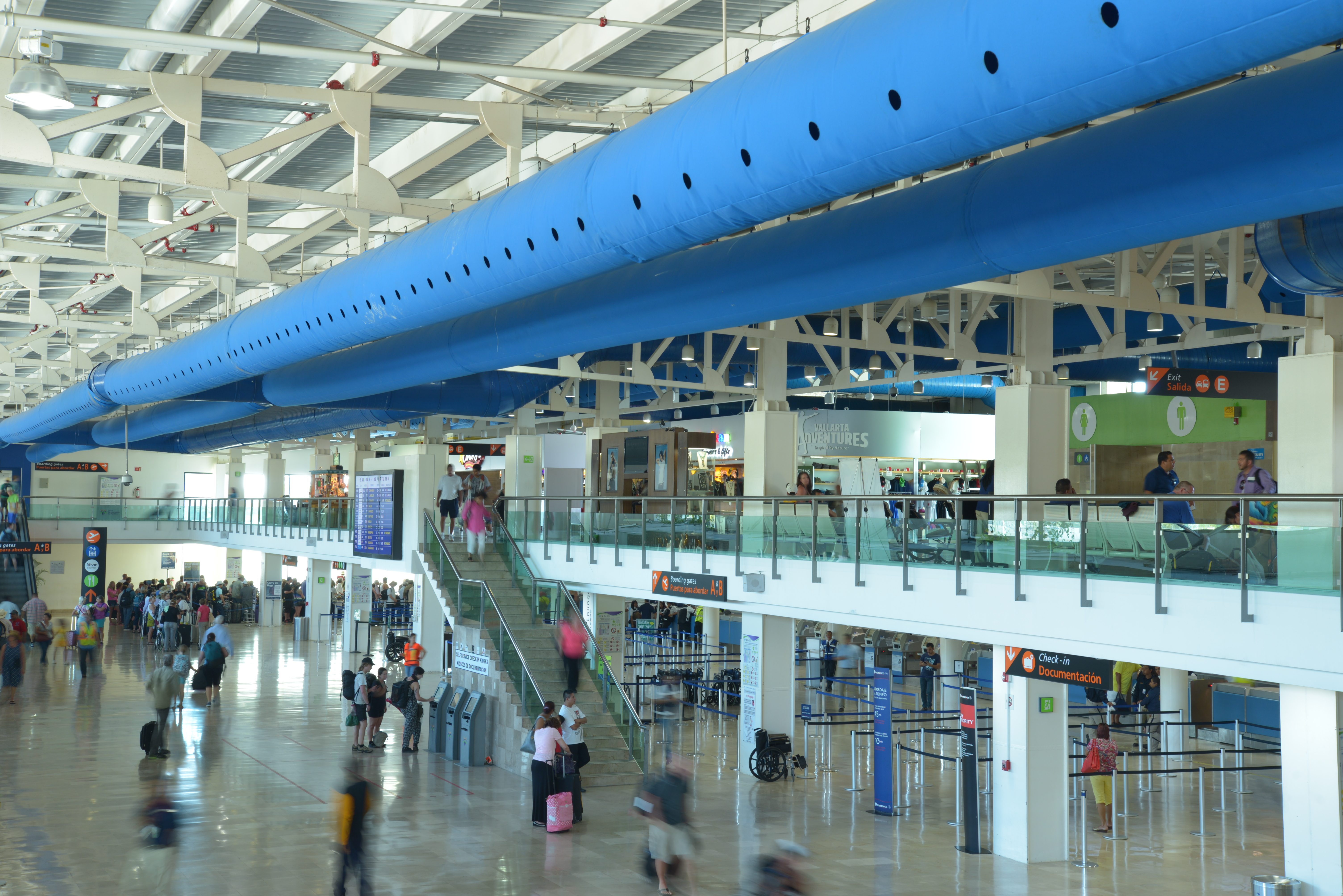 Aeropuerto Puerto Vallarta